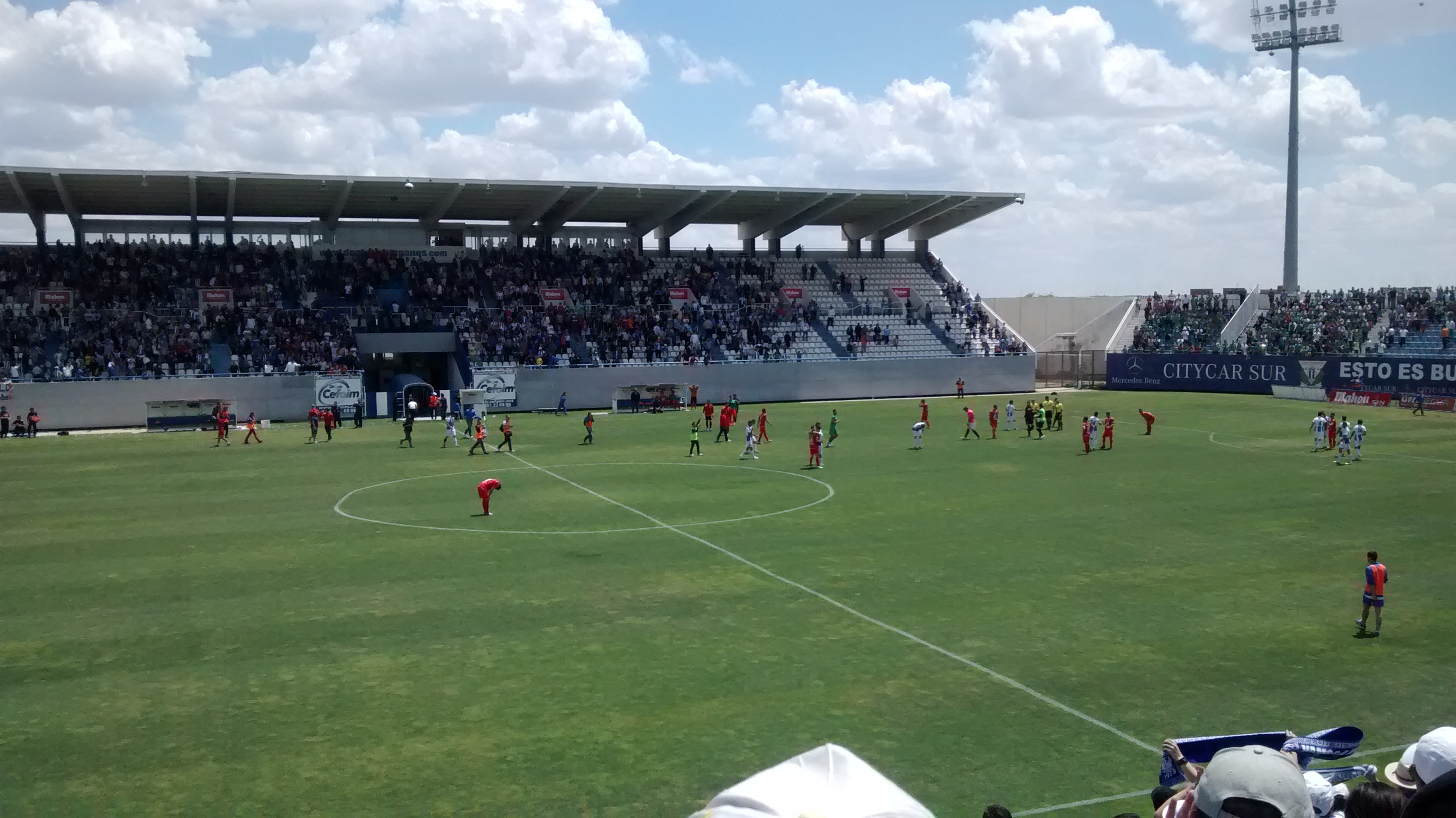 Leganés - Guijuelo play off 2014 2